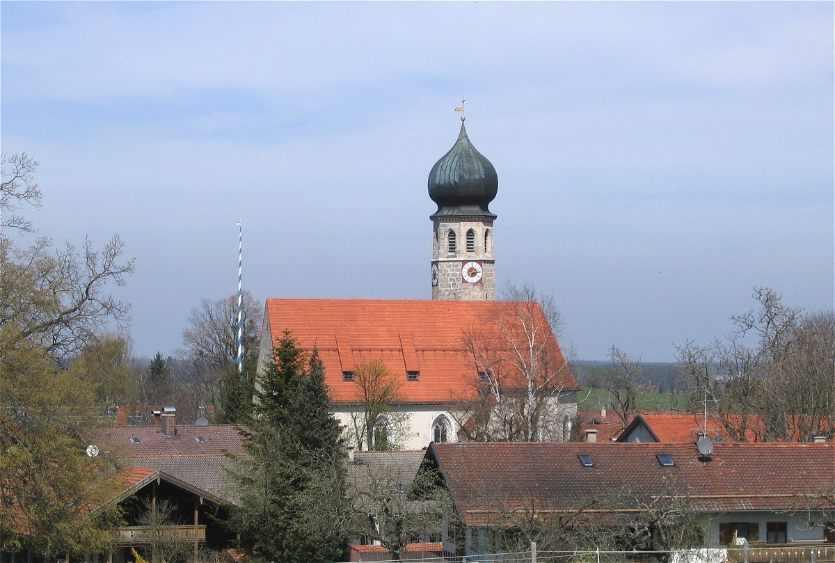 Oberwarngau, Oberbayern